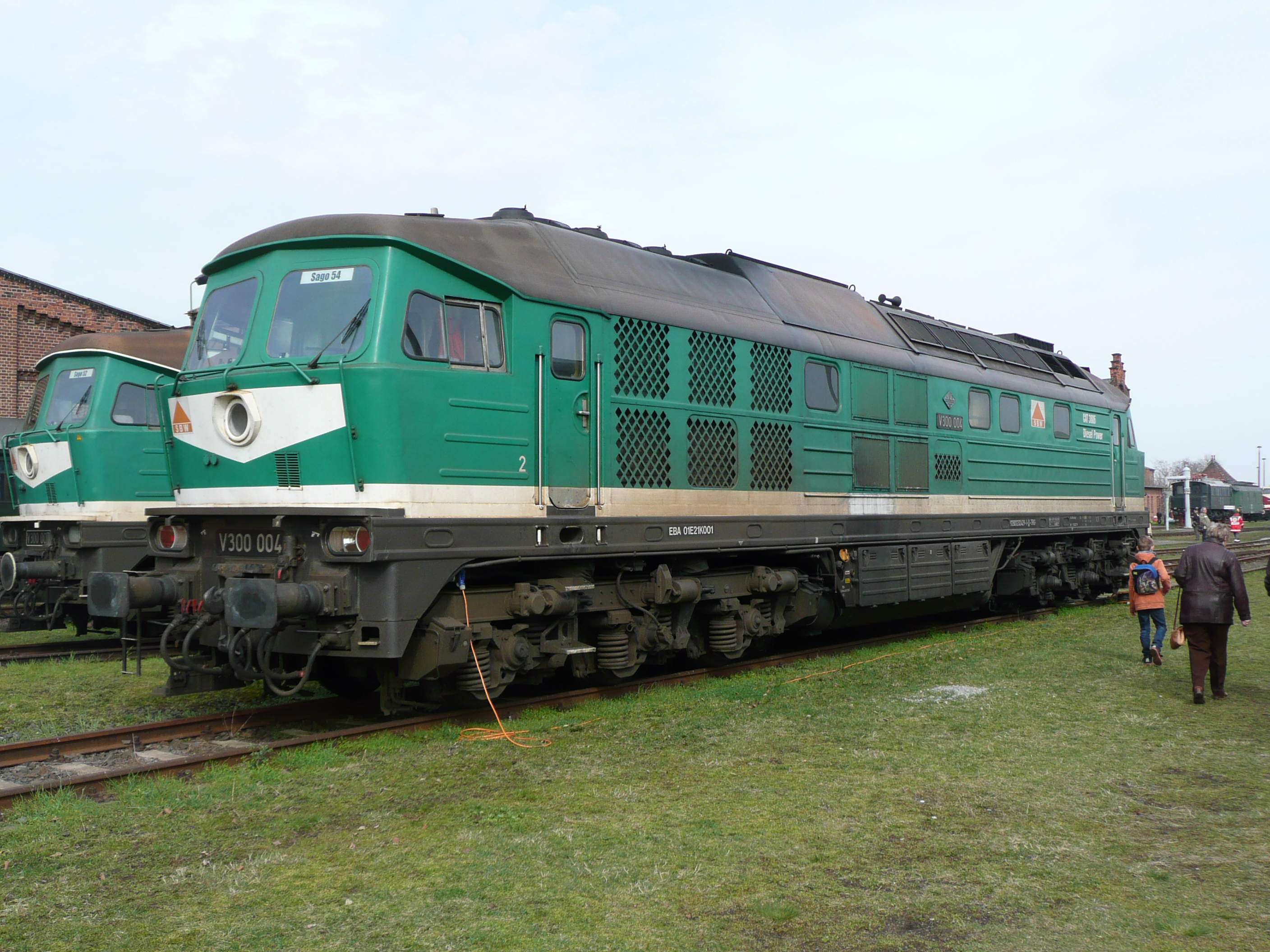 V 300.004 im Traditionsbetriebswerk Staßfurt